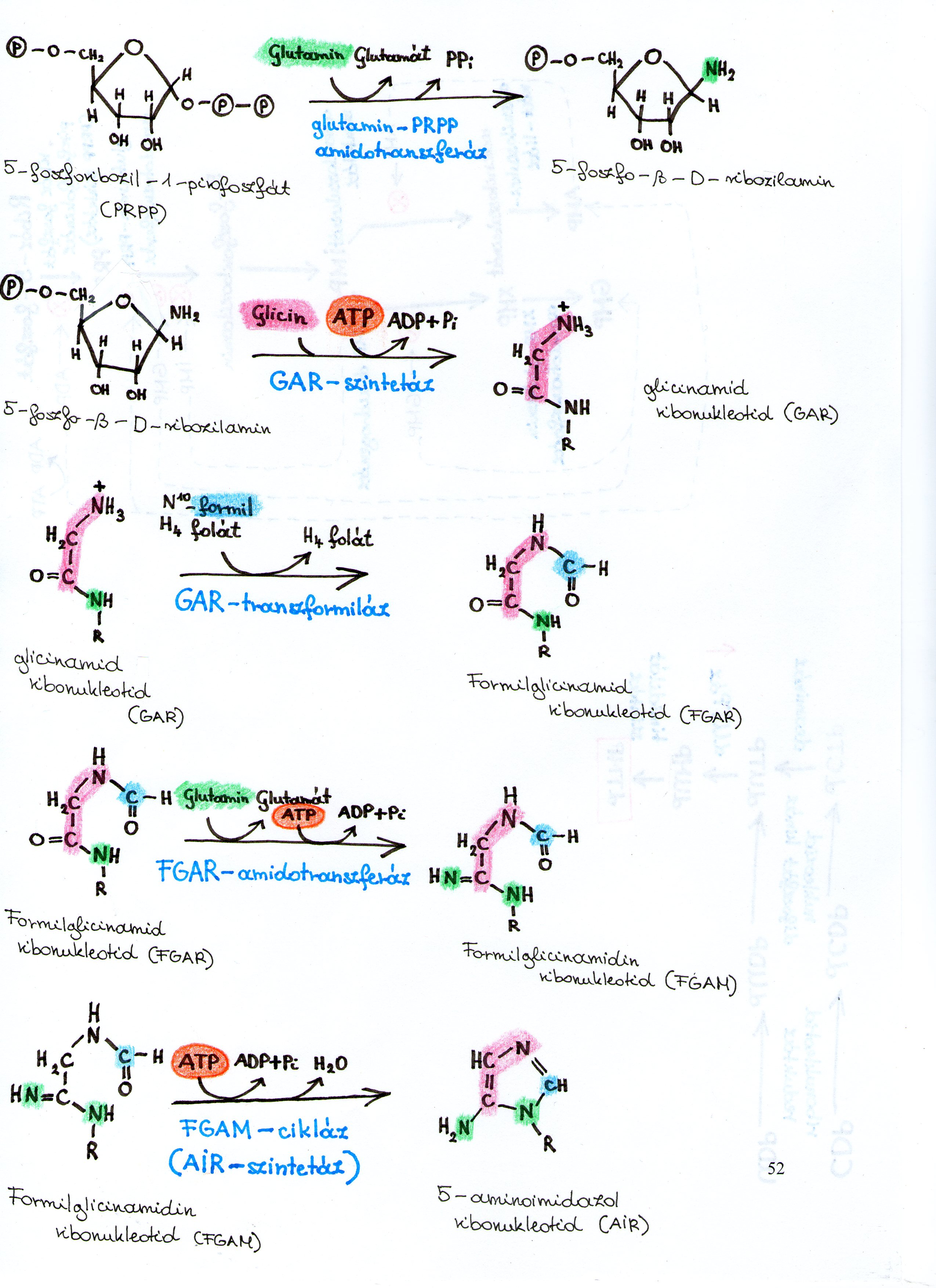 Ez a kép a purin bioszintézis első 6 lépését ábrázolja.